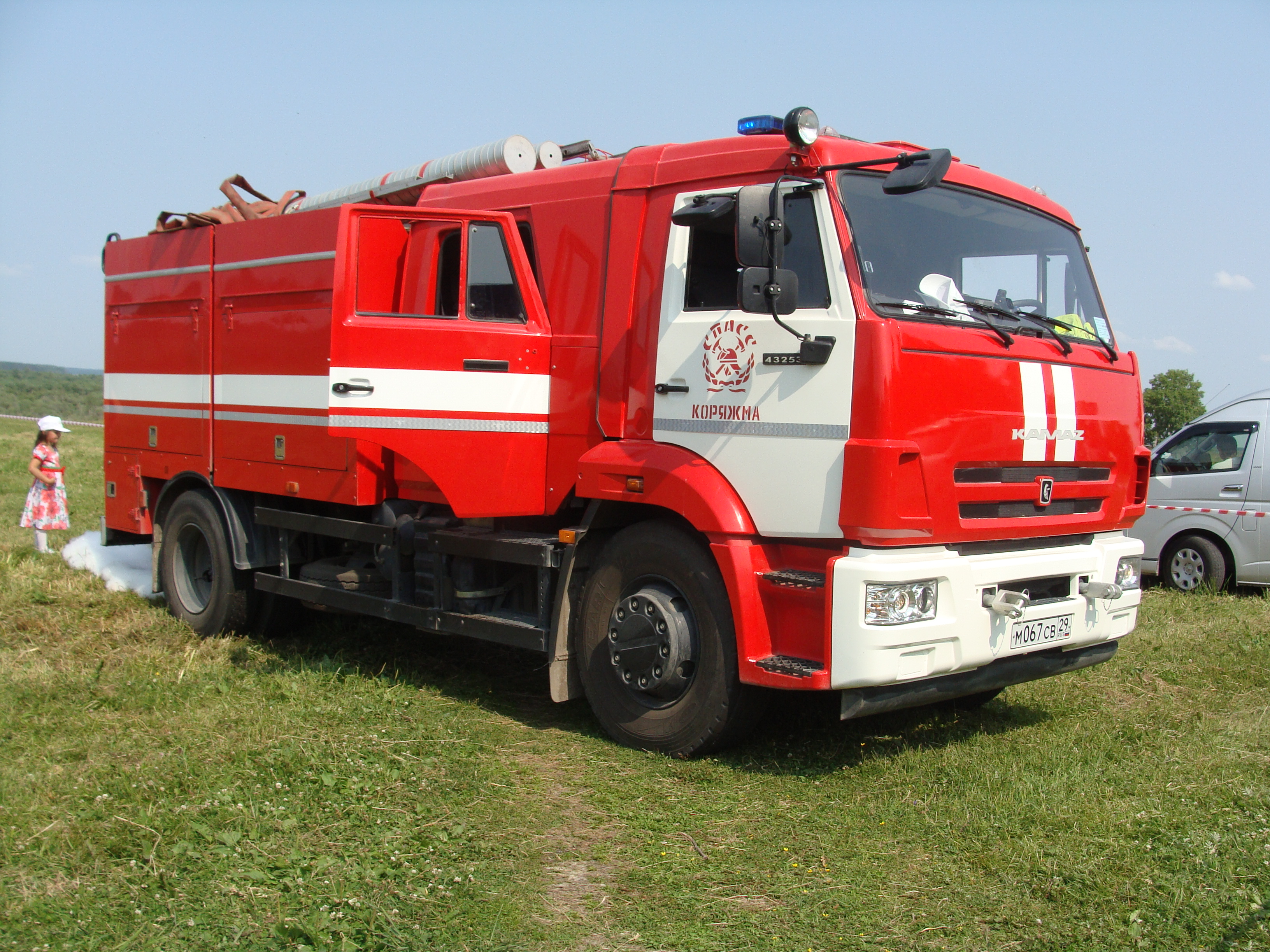 Пожарная техника после показательных выступлений в день Илима